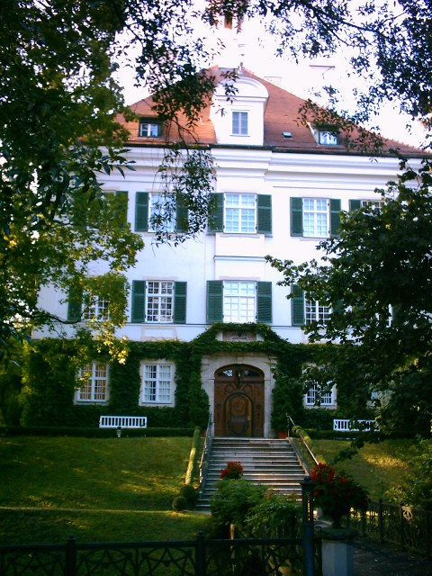 Schloss der Familie von Gravenreuth in Affing (Süd-Ansicht)